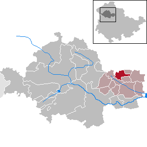 Mittelsömmern in Thuringia - Unstrut-Hainich-Kreis